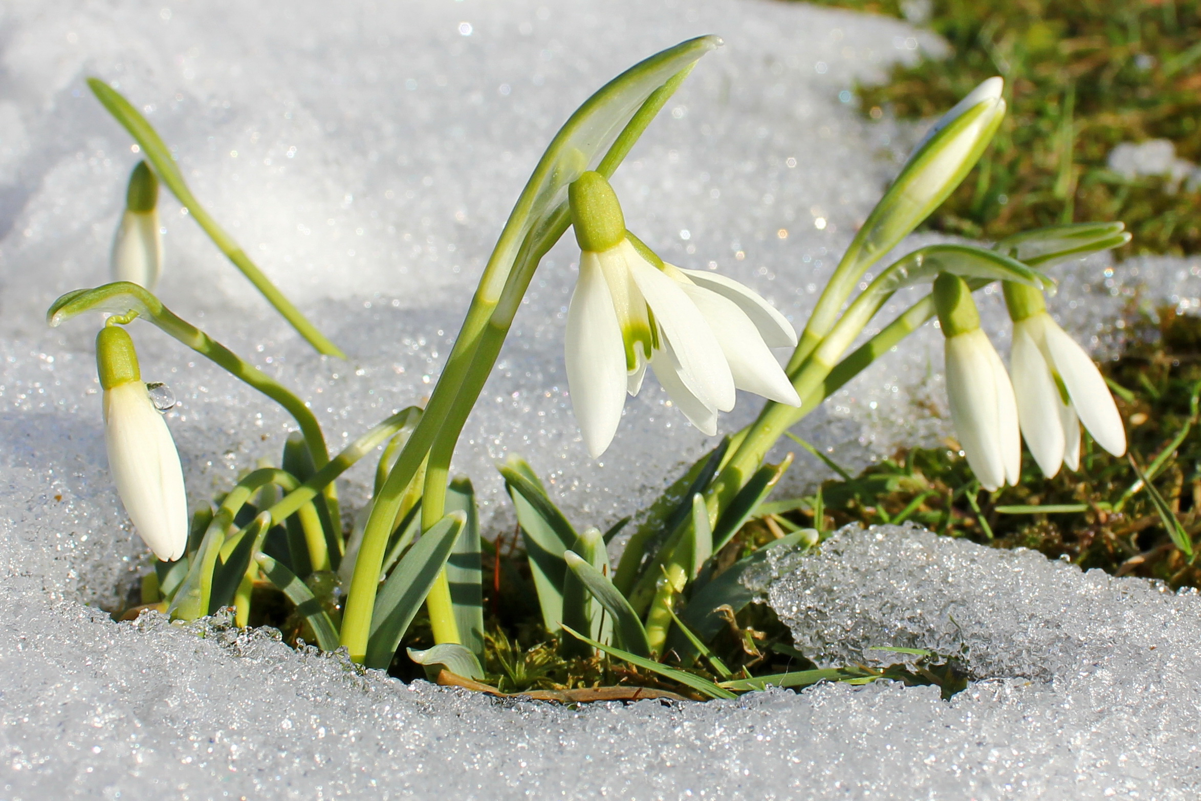 Schneeglöckchen in Hohndorf im Erzgebirge. Sachsen.